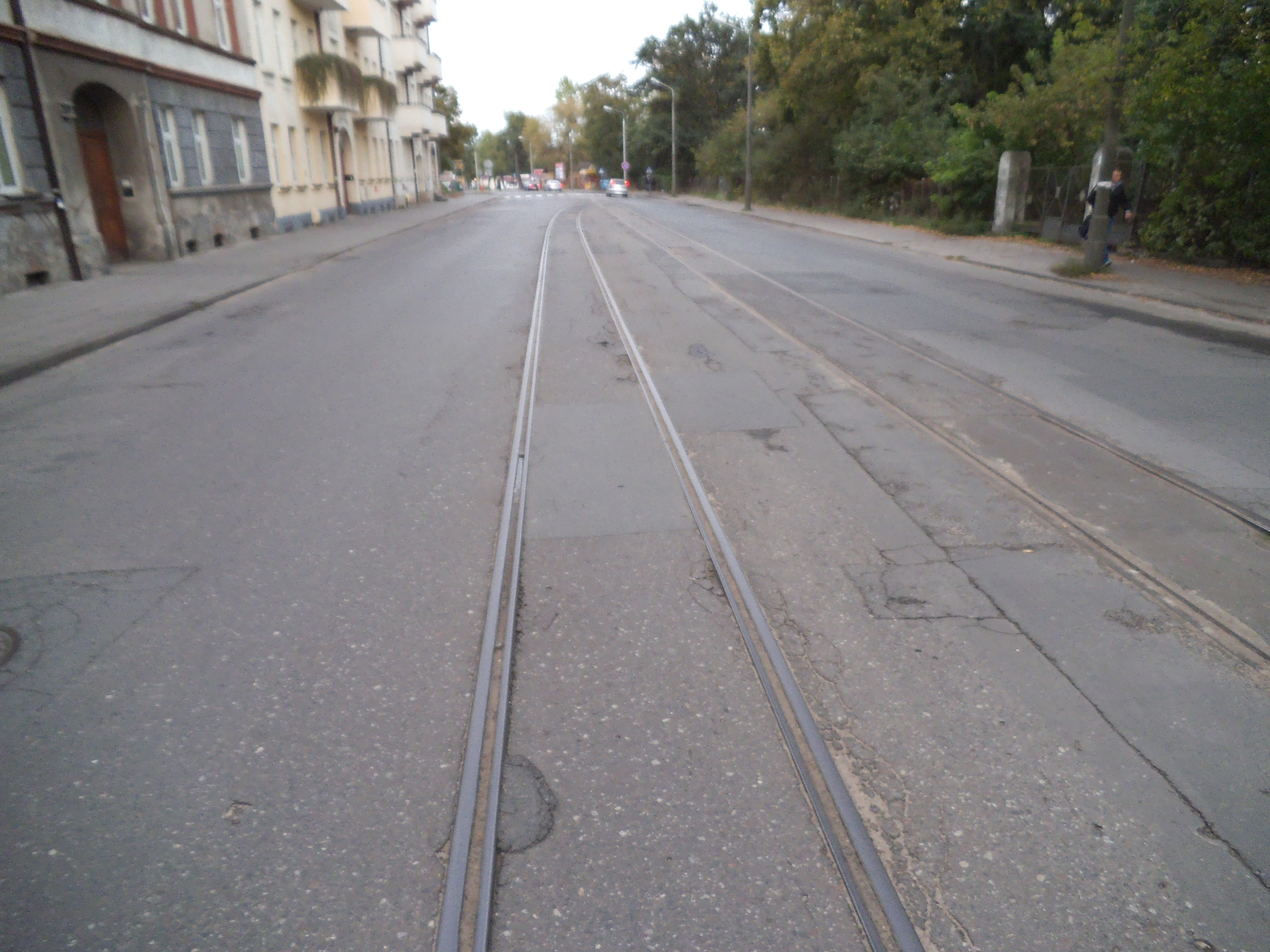 Mijanka tramwajowa na Chełmińskim Przedmieściu w Toruniu. Czynna do 1991 roku, aktualnie odcięta od sieci